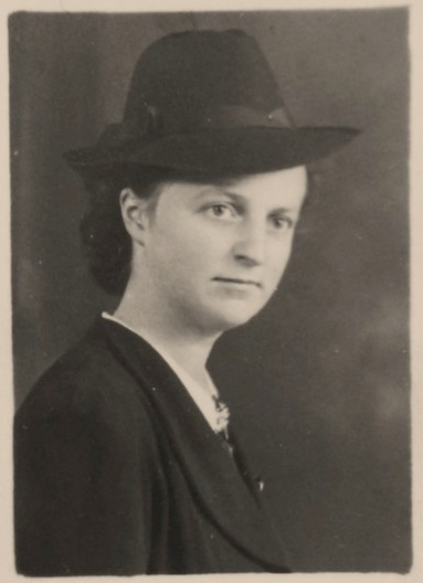 Judith Declercq (née à Wielsbeke et décédée à Waregem), était la responsable de la Province de Flandre-Occidentale pour l’office de la Naissance et de l’Enfance, après la Seconde Guerre mondiale.